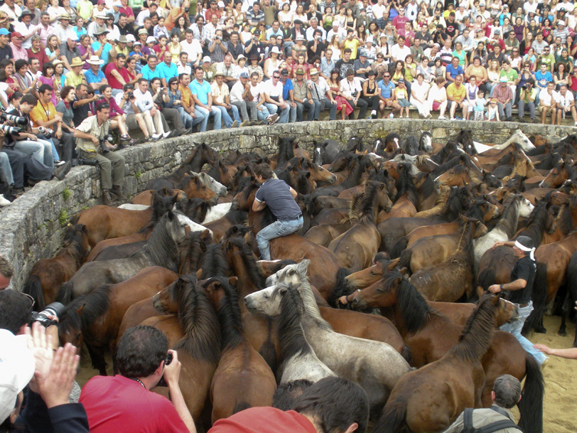 Da una idea del ambiente.